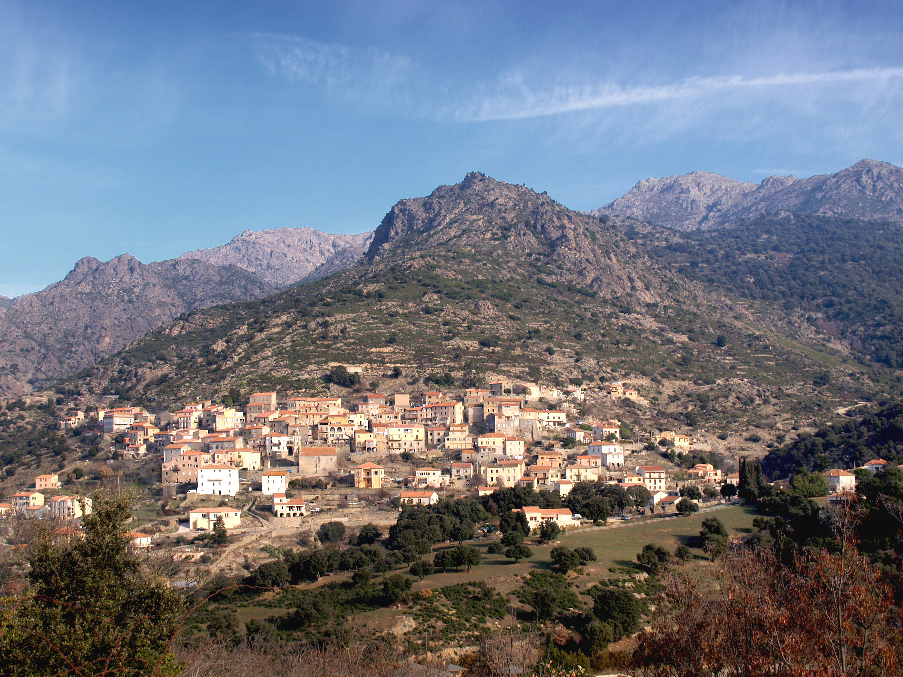 Pietralba (Corsica) - Vue du village